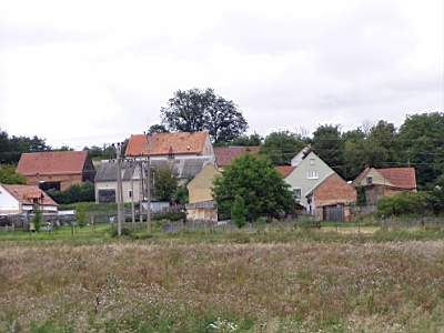 Pohled na část obce.